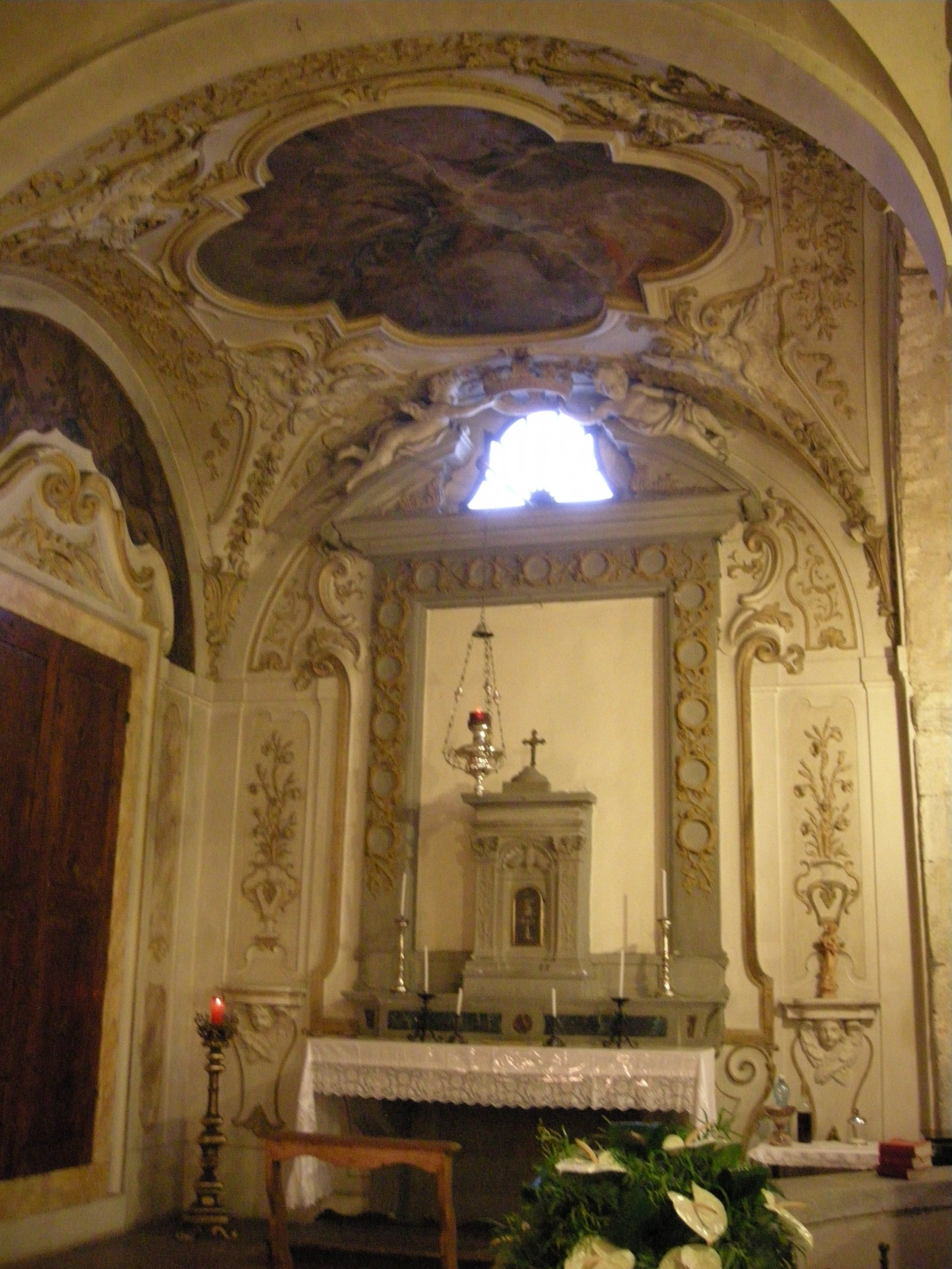 Pieve di Sant'Alessandro a Giogoli, interno, cappellina barocca